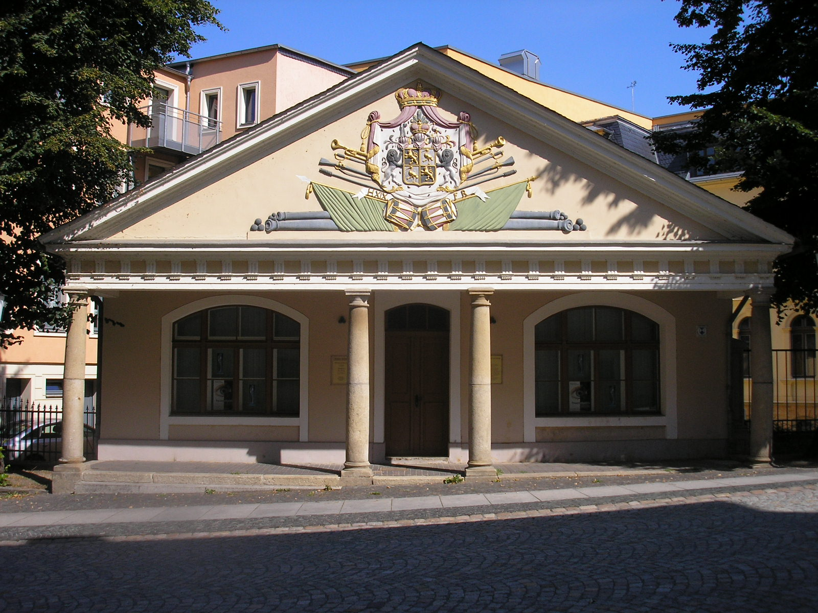 Die Hauptwache am Unteren Schloss in Greiz (Thüringen).